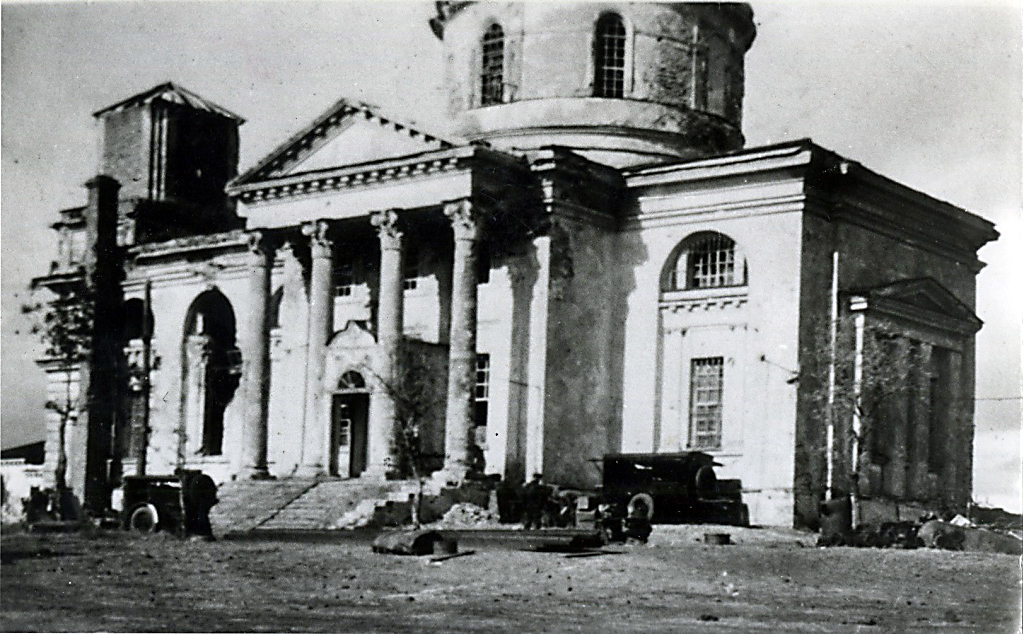 Фото Свято-Успенского храма начала XX века.